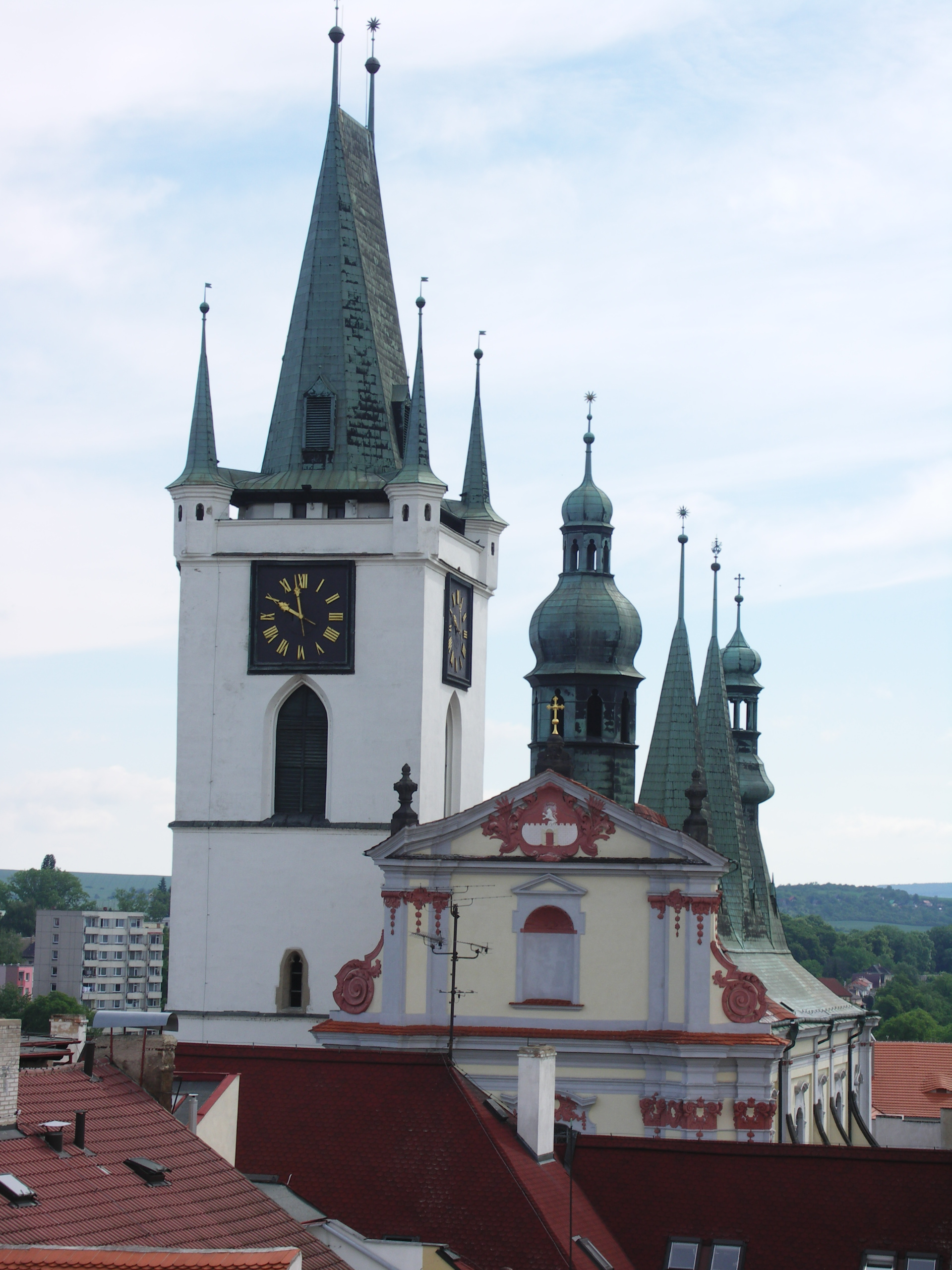 Kostel Všech svatých (Litoměřice), Dlouhá, Litoměřice